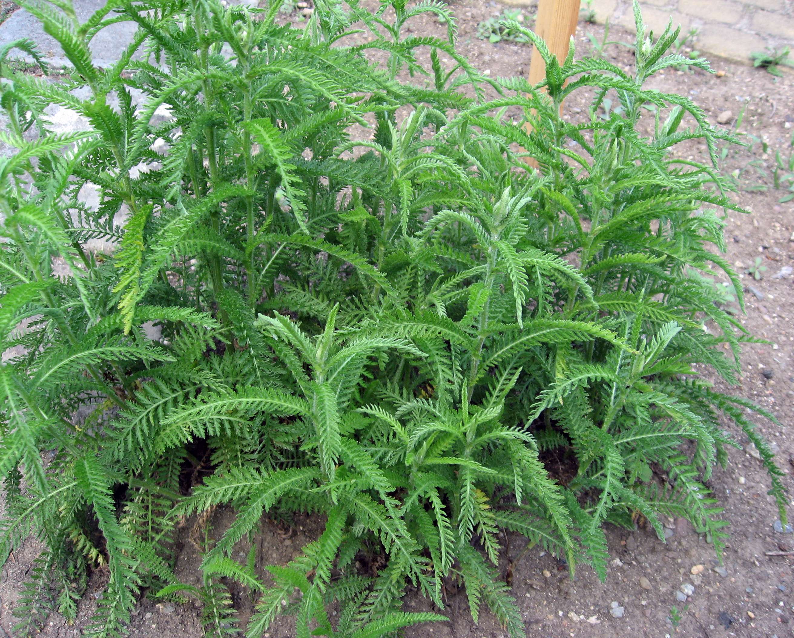 Řebříček oddálený